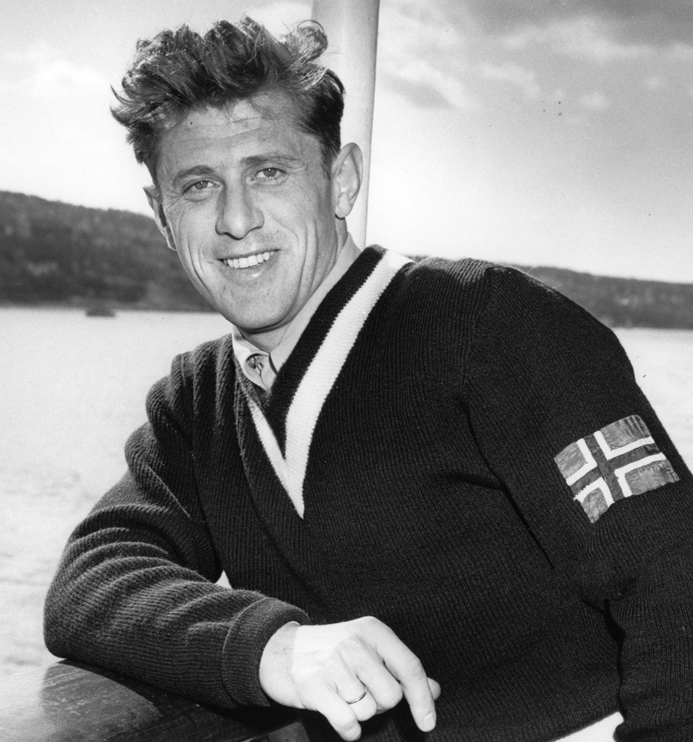 Petter Hugsted på Amerikabåten. Petter Hugsted on a NAL-ship.